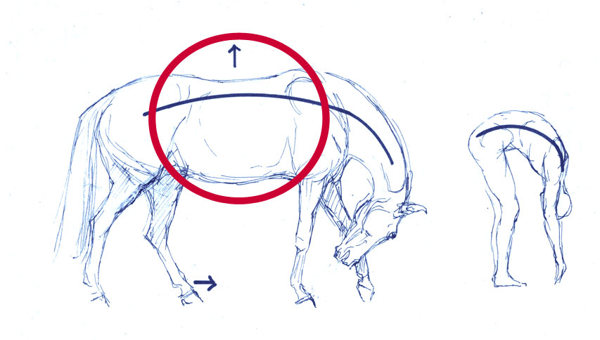 Kreisbogen im Pferd - nach oben schwingender Rücken